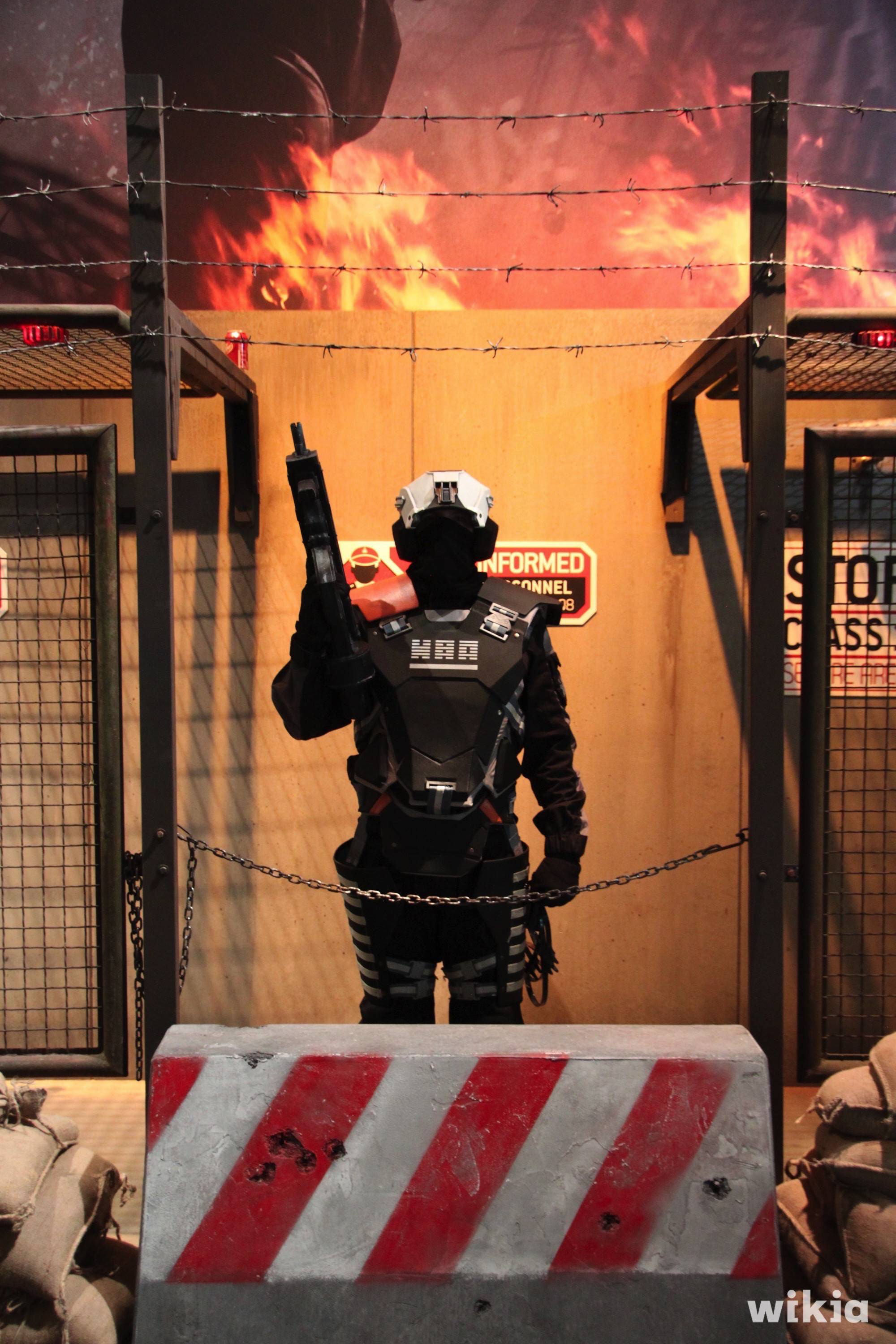 Impressionen: Zweiter Tag, Donnerstag (offen für alle!) Gamescom 2015 impressions